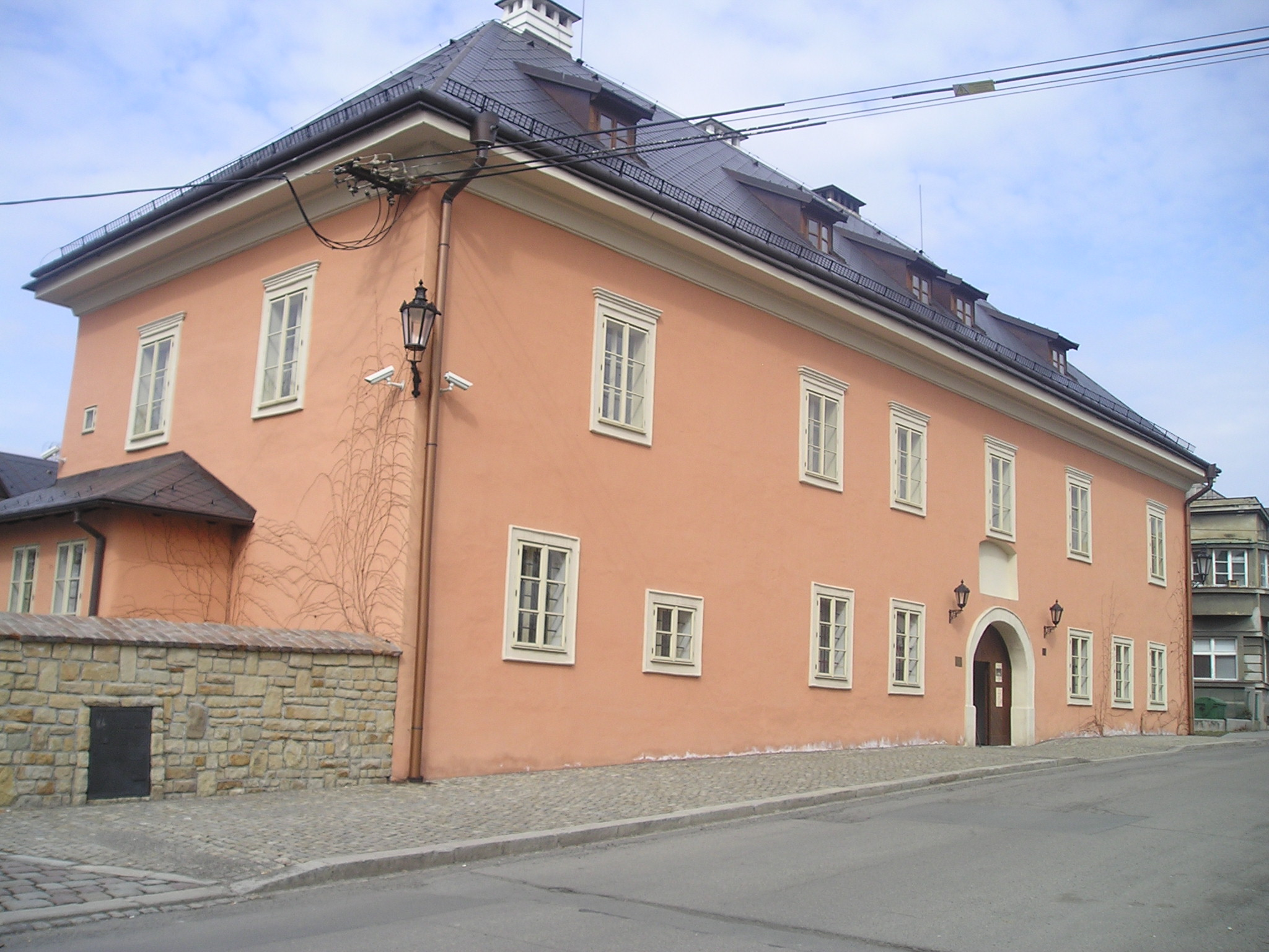 Zábřežský zámek-průčelí